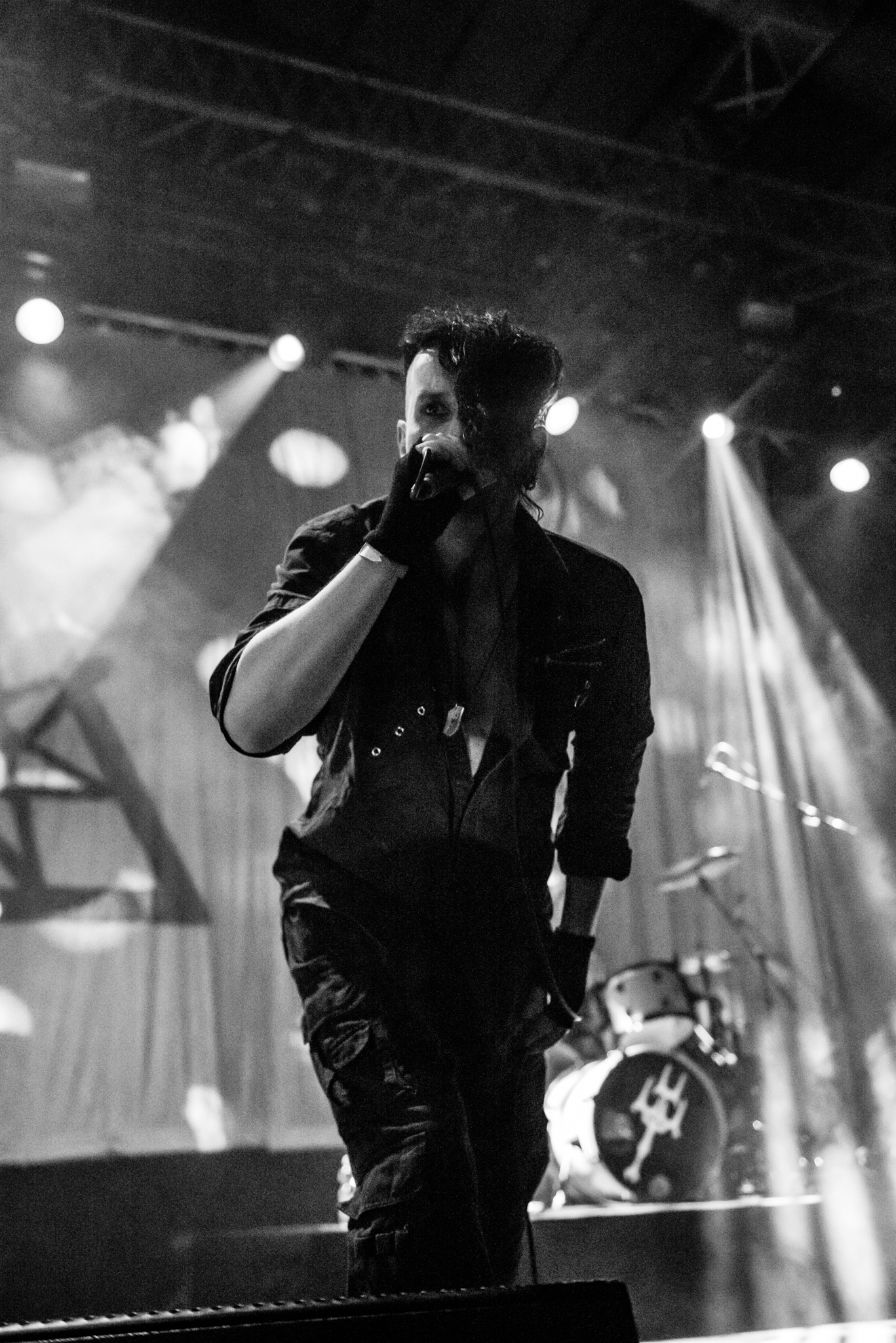 'E-Tropolis 2015; Oberhausen Turbinenhalle': 'Project Pitchfork'